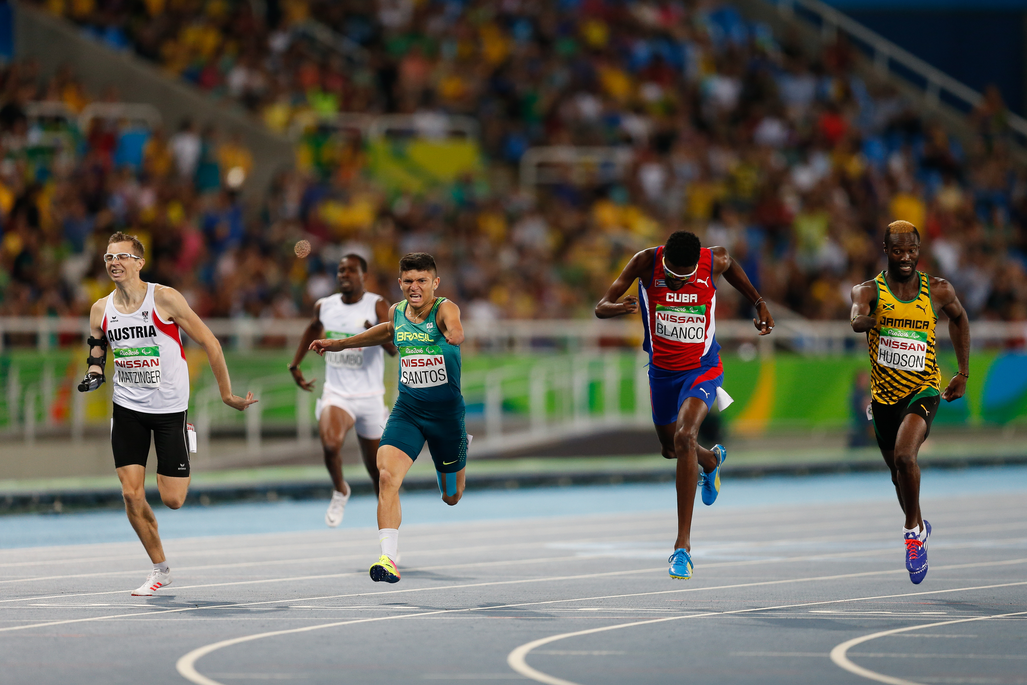 Rio de Janeiro - Petrucio Santos leva prata nos 400m T47 nos Jogos Paralmpicos Rio 2016. (Fernando Frazão/Agência Brasil)